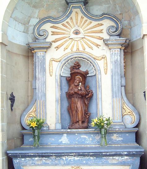 Limburgs: Heilige Gerlachus in zien kapel in Houtem-St. Gerlach.